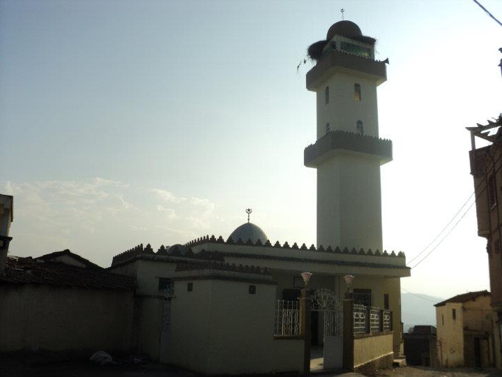 Facade devant de la mosquée de Tala Athmane.